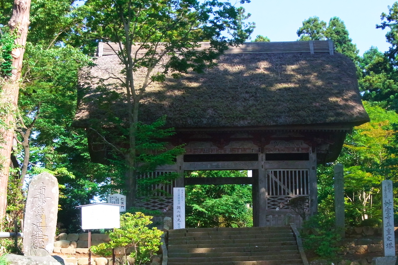 佐渡の中央部にある、阿仏坊妙宣寺です。山門も立派です。